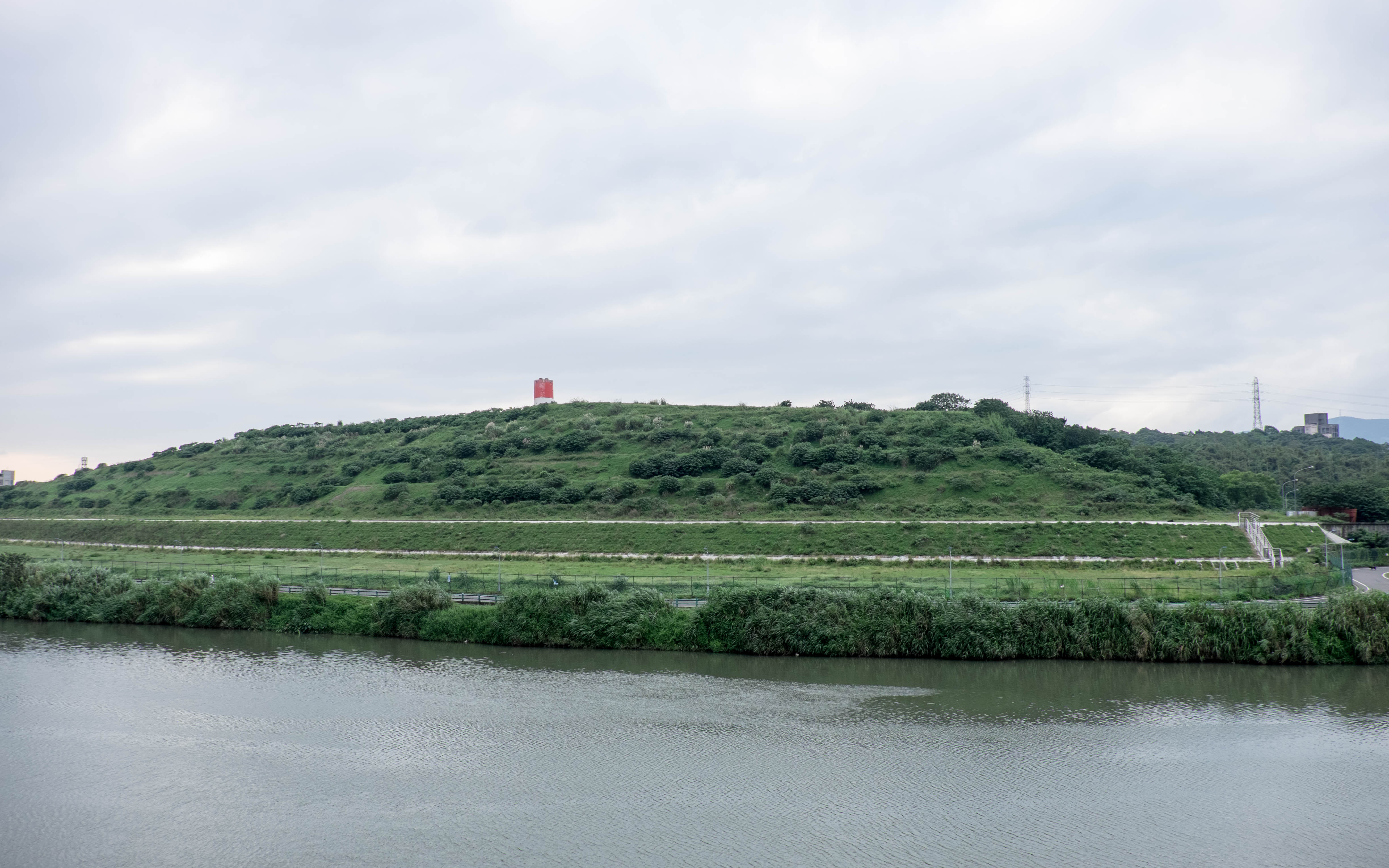 中文（台灣）: 從南湖左岸河濱公園疏散梯北望南湖右岸河濱公園與原葫洲里垃圾掩埋場（內湖垃圾山）。